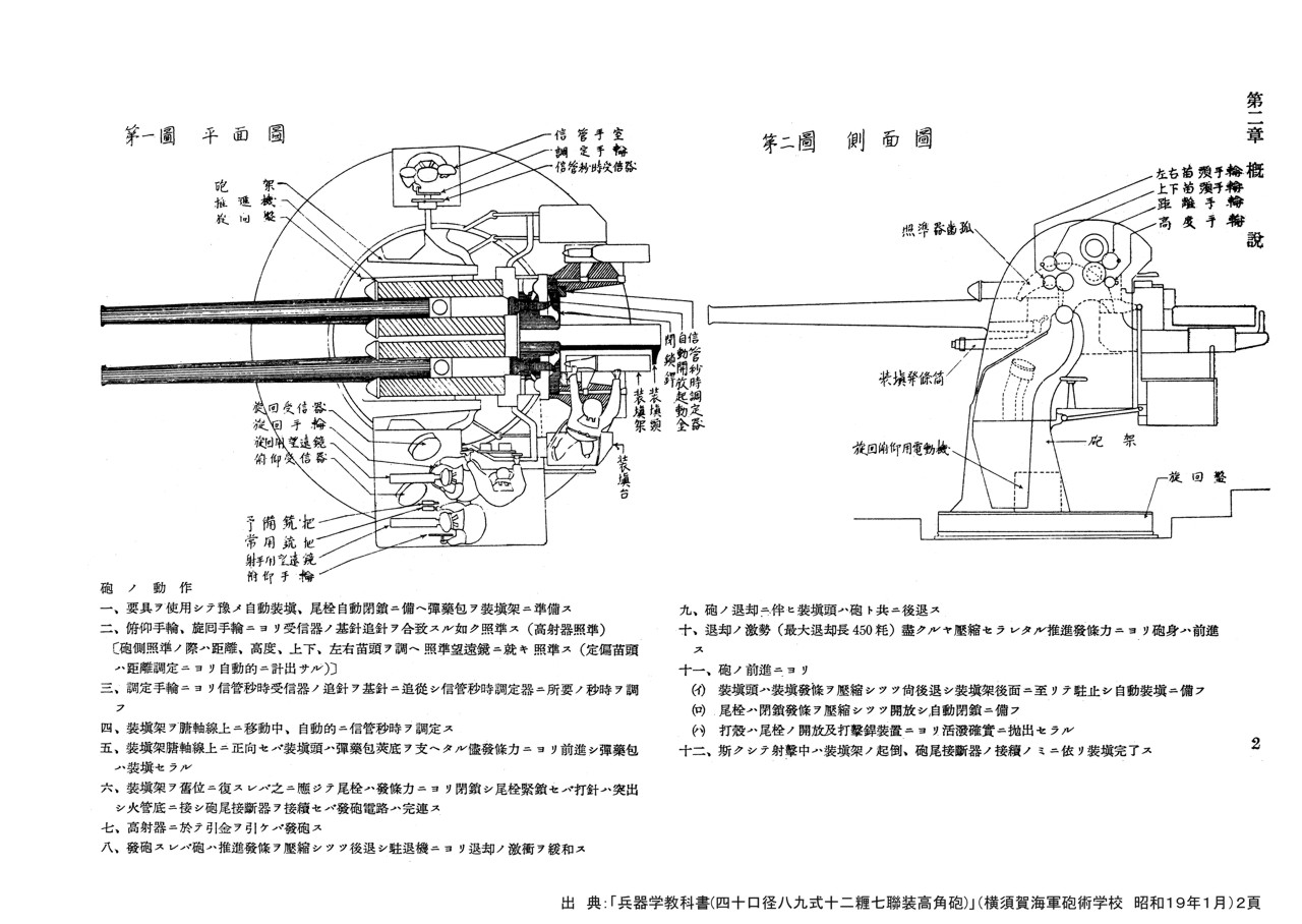 四十口径八九式十二糎七聯装高角砲